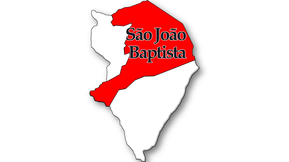 Evolução da População